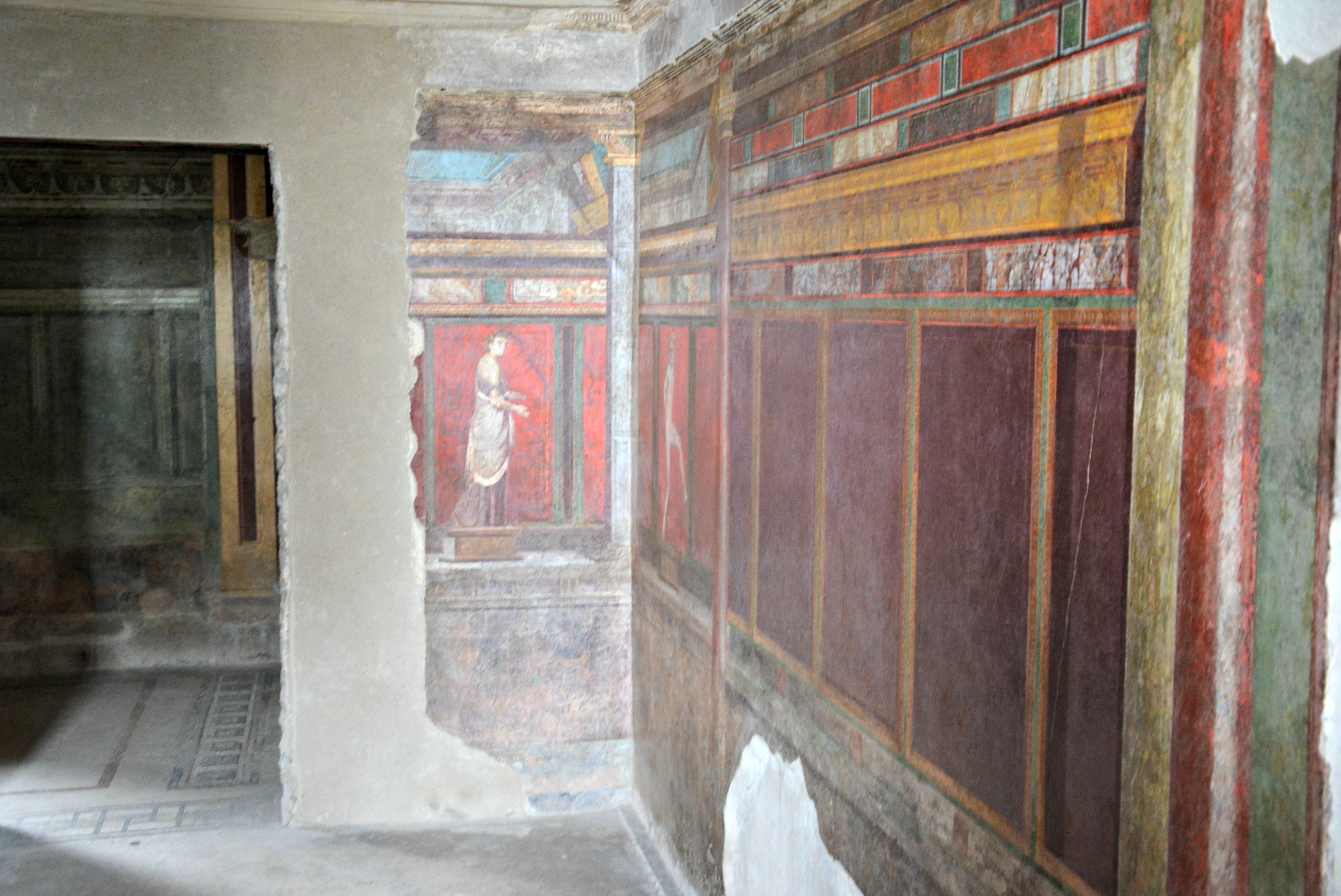 Bottega - MIBACT This is a photo of a monument which is part of cultural heritage of Italy.